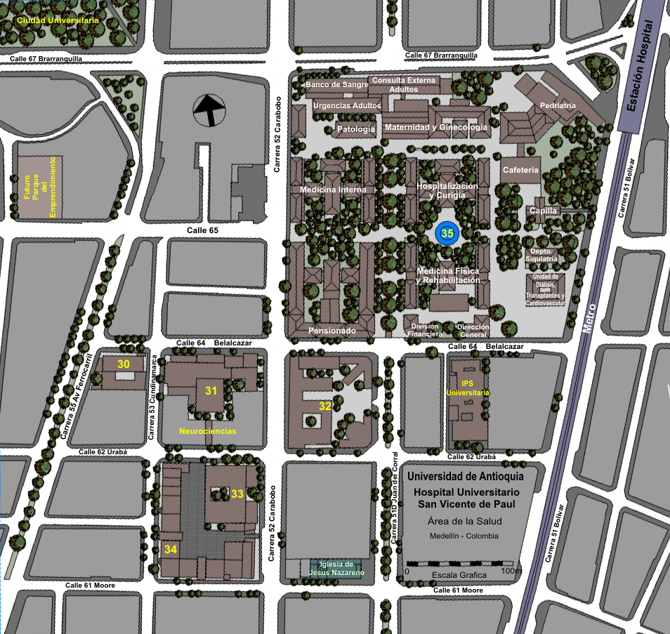 Plano del Área de la Salud de la Universidad de Antioquia, Medellín, Colombia. (Yo el autor, realice el plano calcándolo de un mapa oficial poco detallado, por esta razón el plano no es 100% exacto en medidas pero la distribución y volumétrica concuerdan con la forma de las manzanas y de los edificios, la escala grafica es sacada intuitivamente, libero mi trabajo al dominio publico: SajoR)